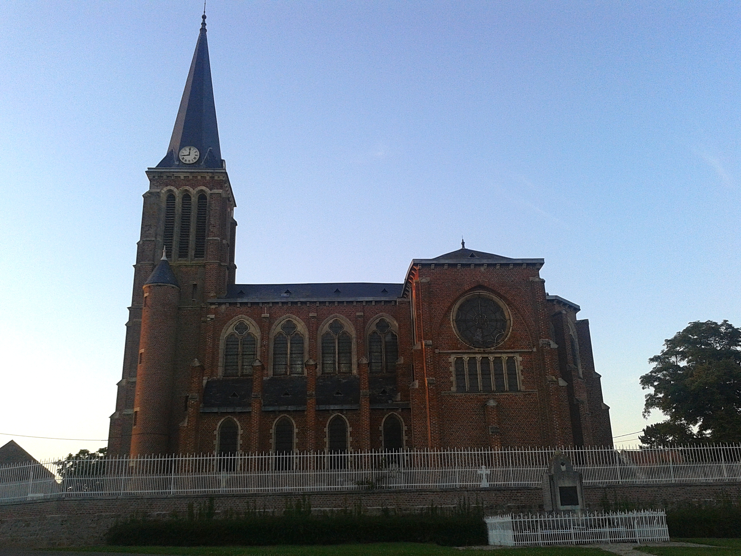 Des photos de mon Village en Hiver sous la neige et en Eté